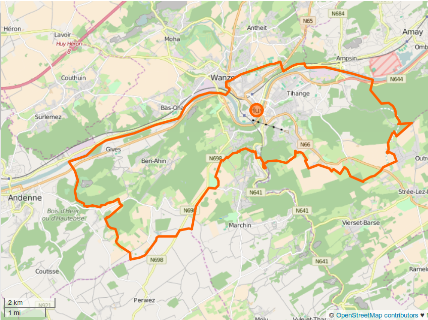 Situation de la commune de Huy en Belgique, OSM. This map may be incomplete, and may contain errors. Don't rely solely on it for navigation.